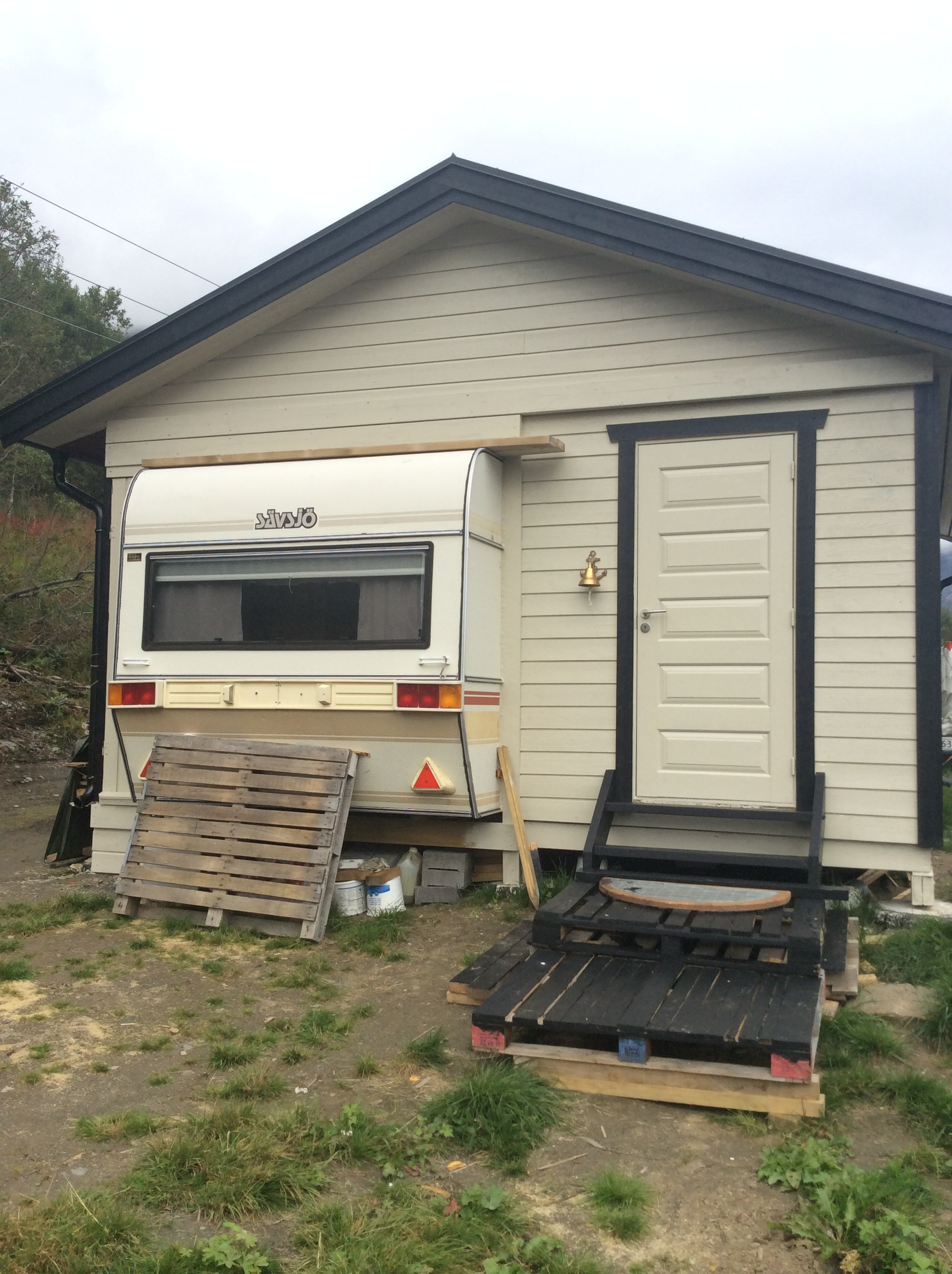 Spikertelt